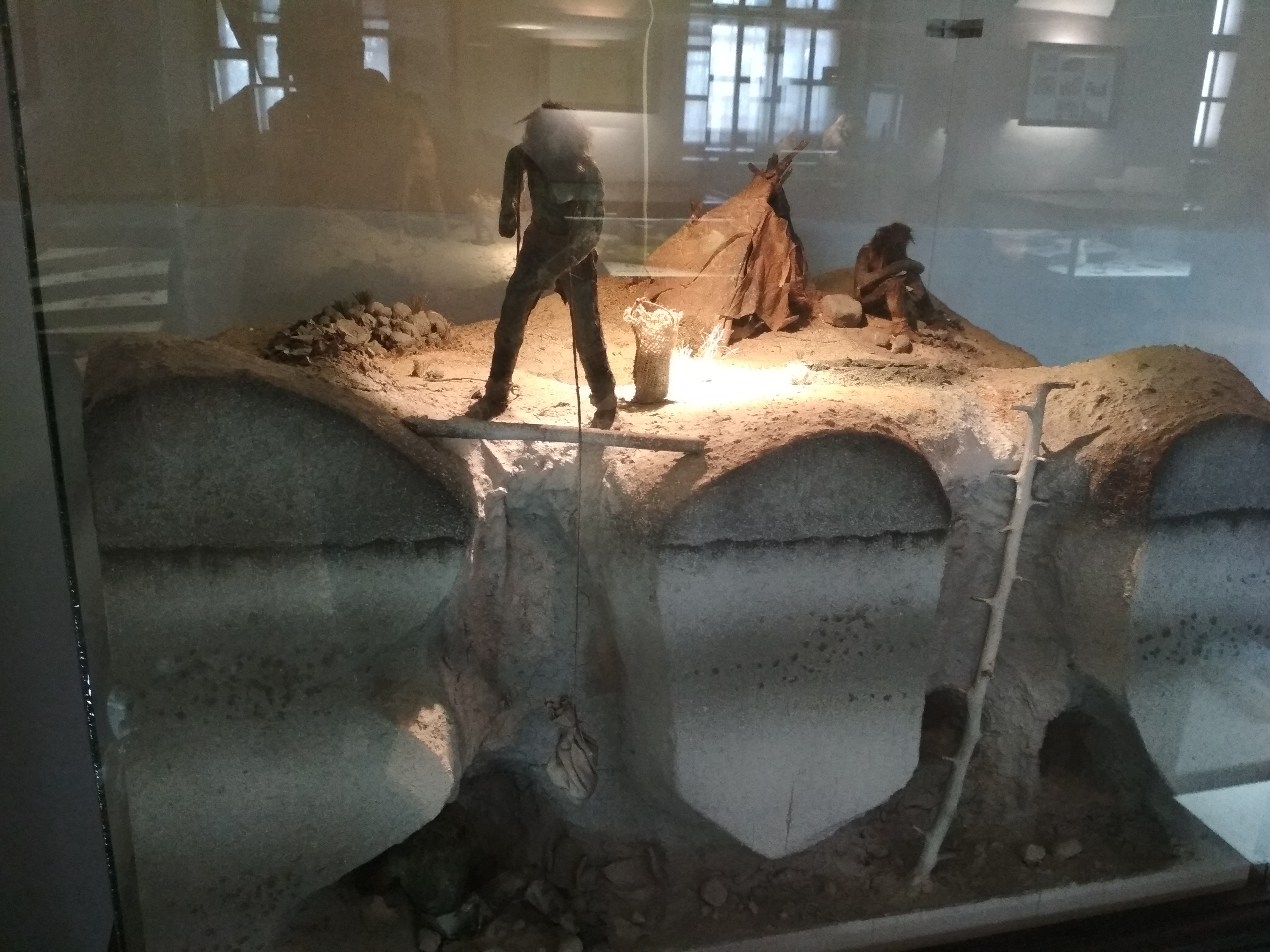 Гродна (2018). ГДГАМ. Шахтавая здабыча крэменю ў эпоху неаліту і бронзавым веку. г.п. Краснасельскі (Ваўкавыскі раён). Мастакі У. П. Голуб, Ф. А. Розаў.